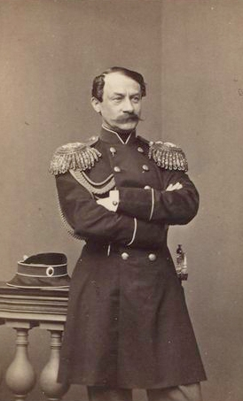 Тимашев, Александр Егорович